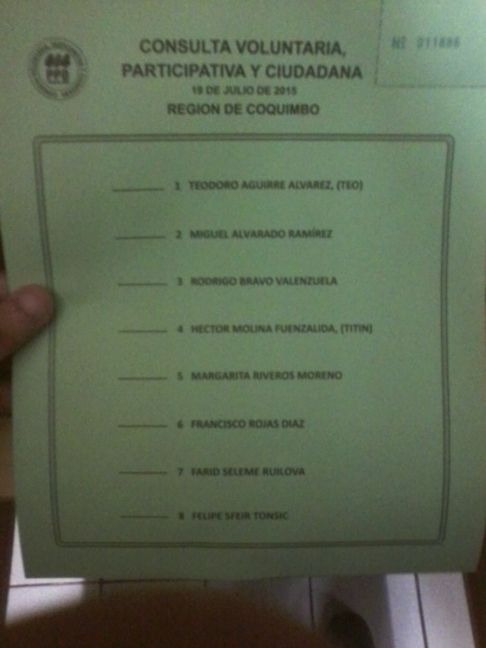 Voto utilizado en la elección complementaria del PPD de 2015 en la Región de Coquimbo